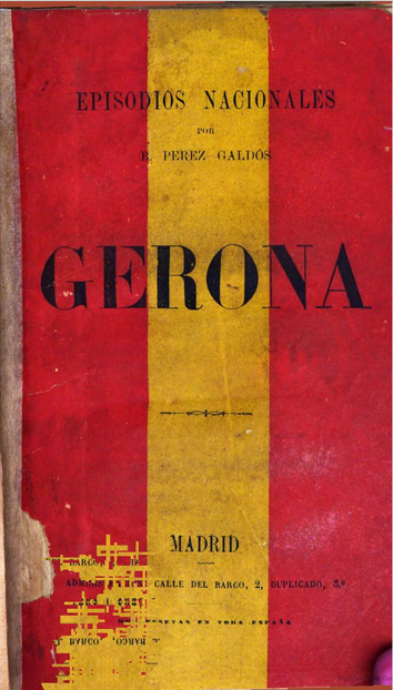 Portada de "Gerona" de Galdós, edición de 1874